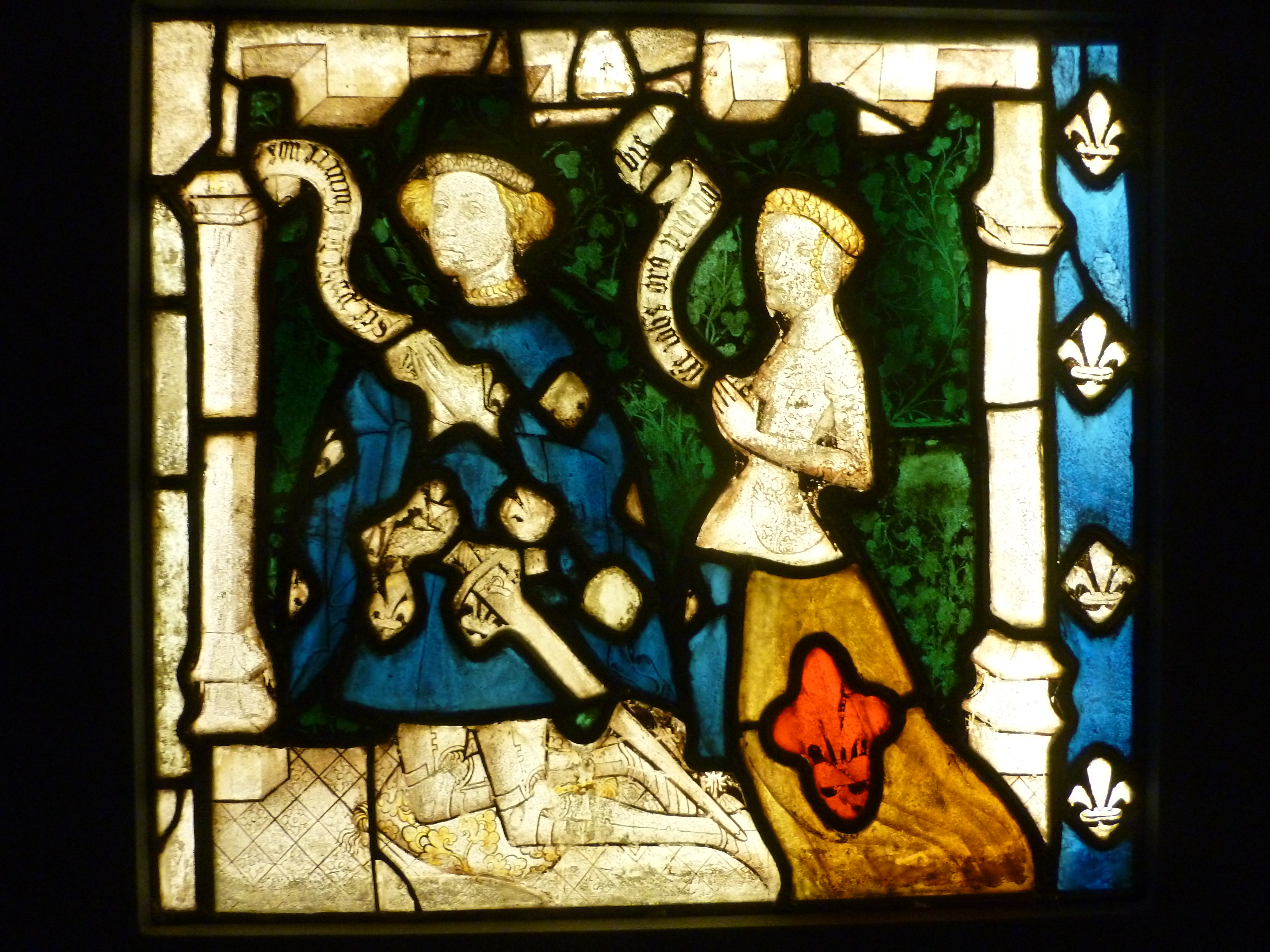 Vitrail provenant de l'église de Betton (Ille et Vilaine), exposé au musée national du Moyen-Âge. Jean de Saint-Gilles, époux de Jeanne de Tilly, nommé en 1424 par Jean V, duc de Bretagne, grand maître et gouverneur des œuvres pour les fortifications de la ville de Rennes, puis chambellan et conseiller du duc en 1425.